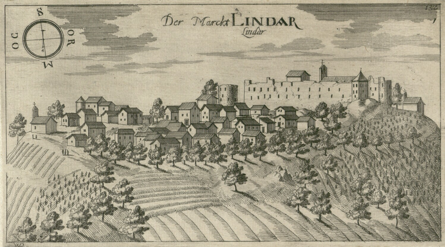 Lindar